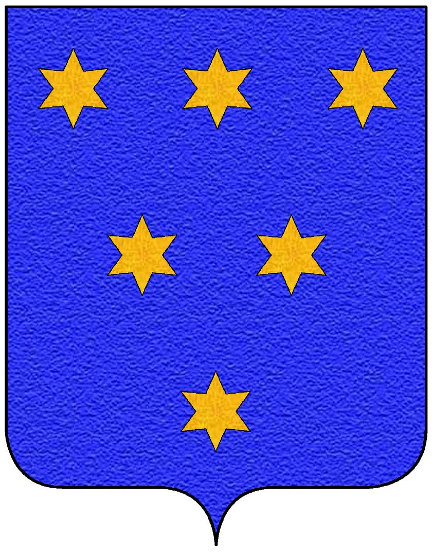 Stemma della famiglia Amato